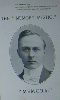 Edward Cyril De Hault Laston